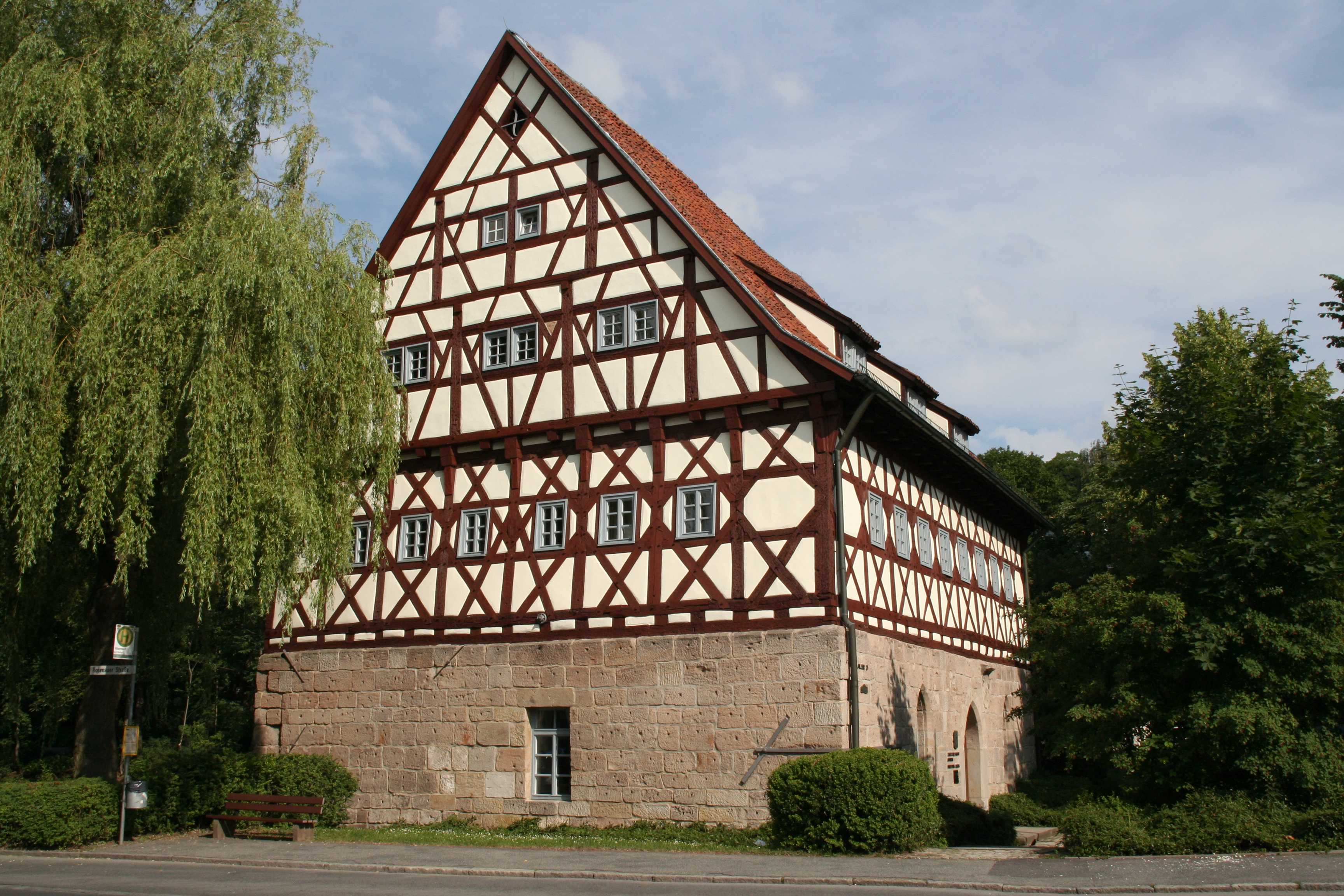 Burg Rosenau in Coburg Allee 3 am Rittersteich